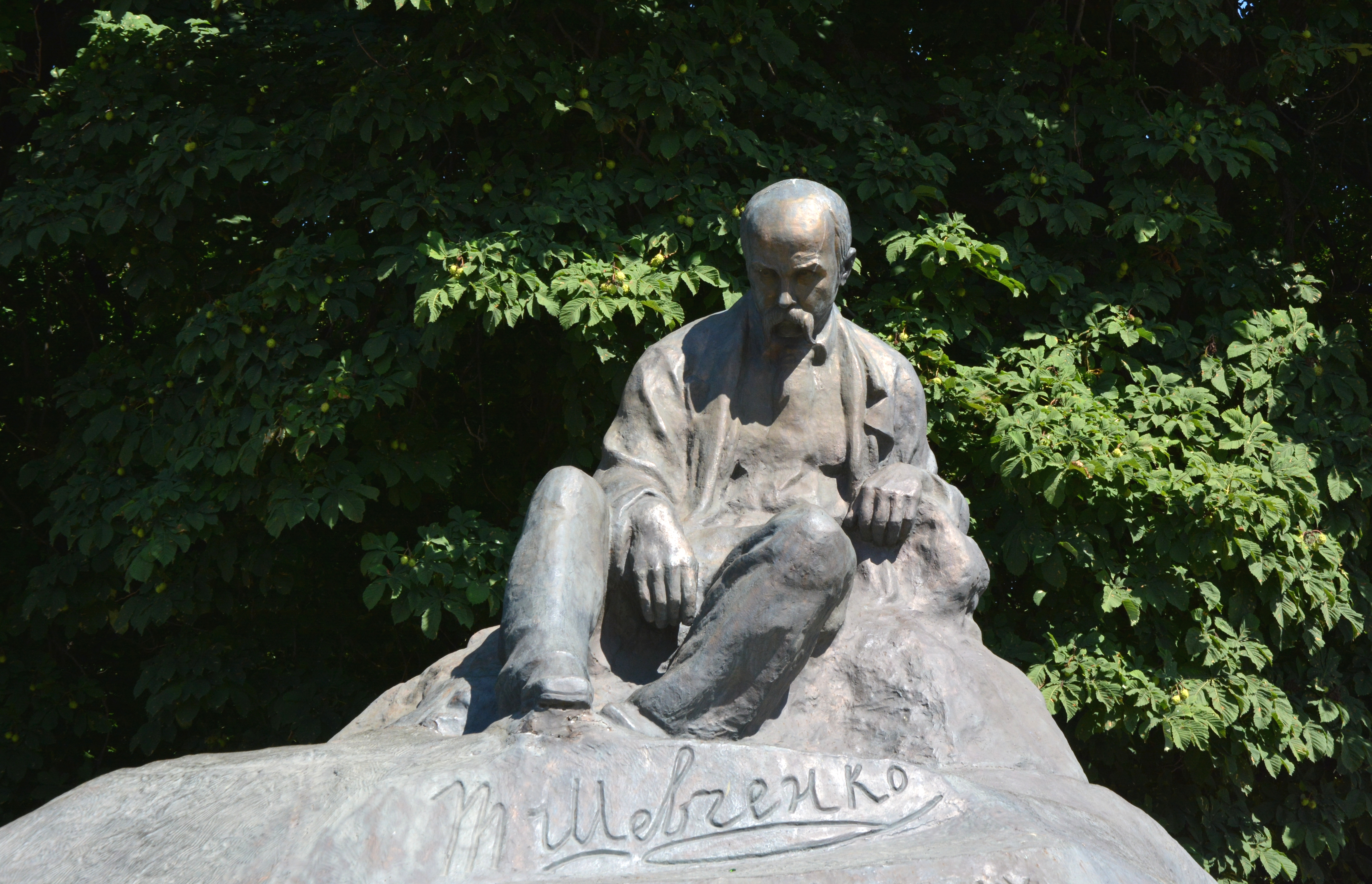 Пам'ятник поету Т. Г. Шевченку, Ромни, бул. Т. Шевченка, 12